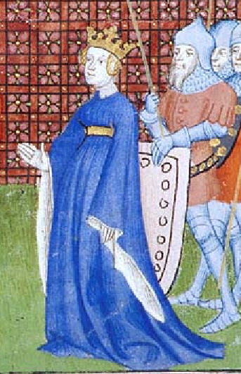 Konstancie z Arles